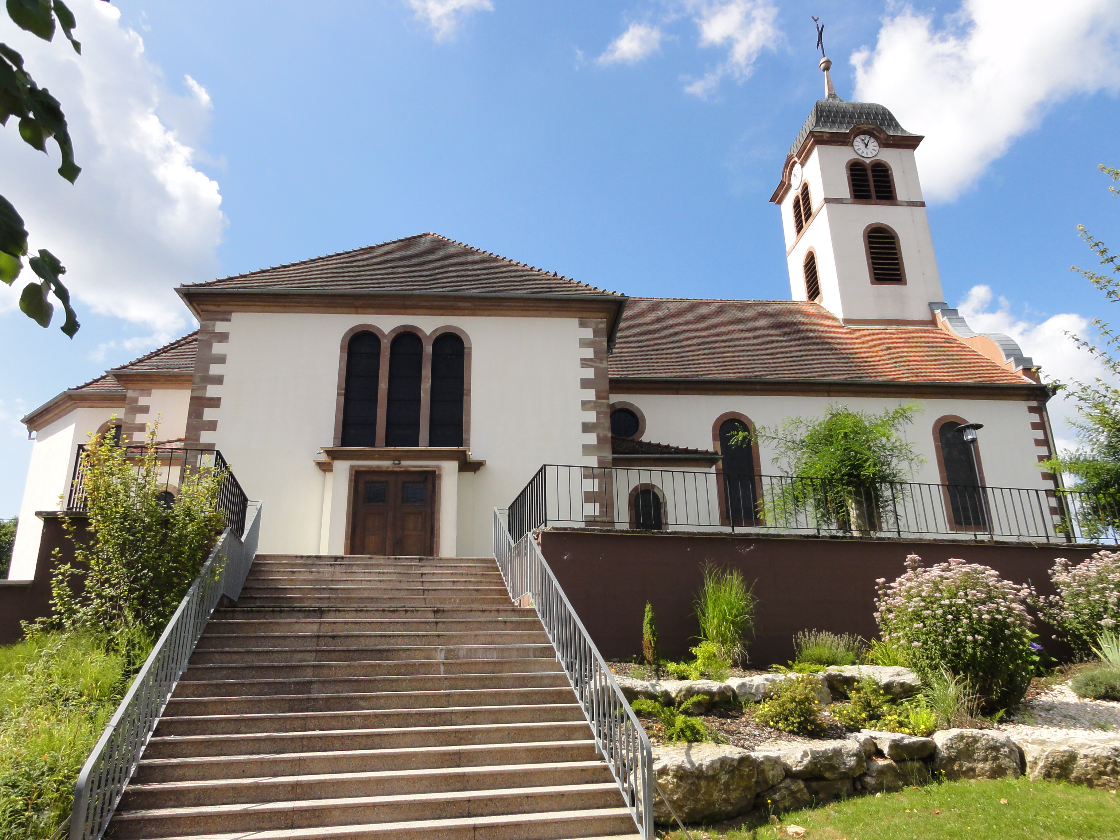 Alsace, Bas-Rhin, Mertzwiller, Église Saint-Michel (IA67005165).